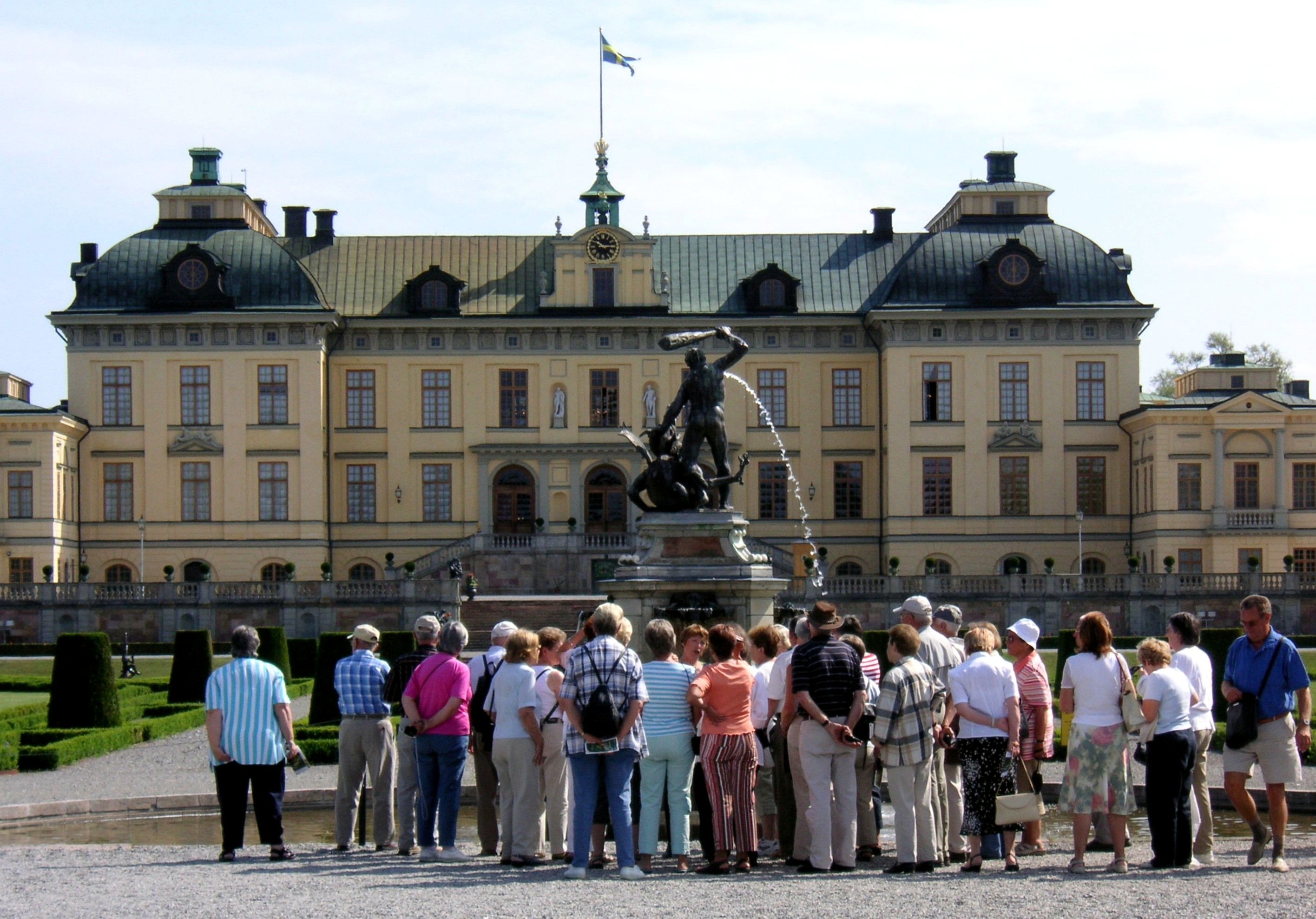 Turister framför Herkulesfontänen på Drottningholms slott